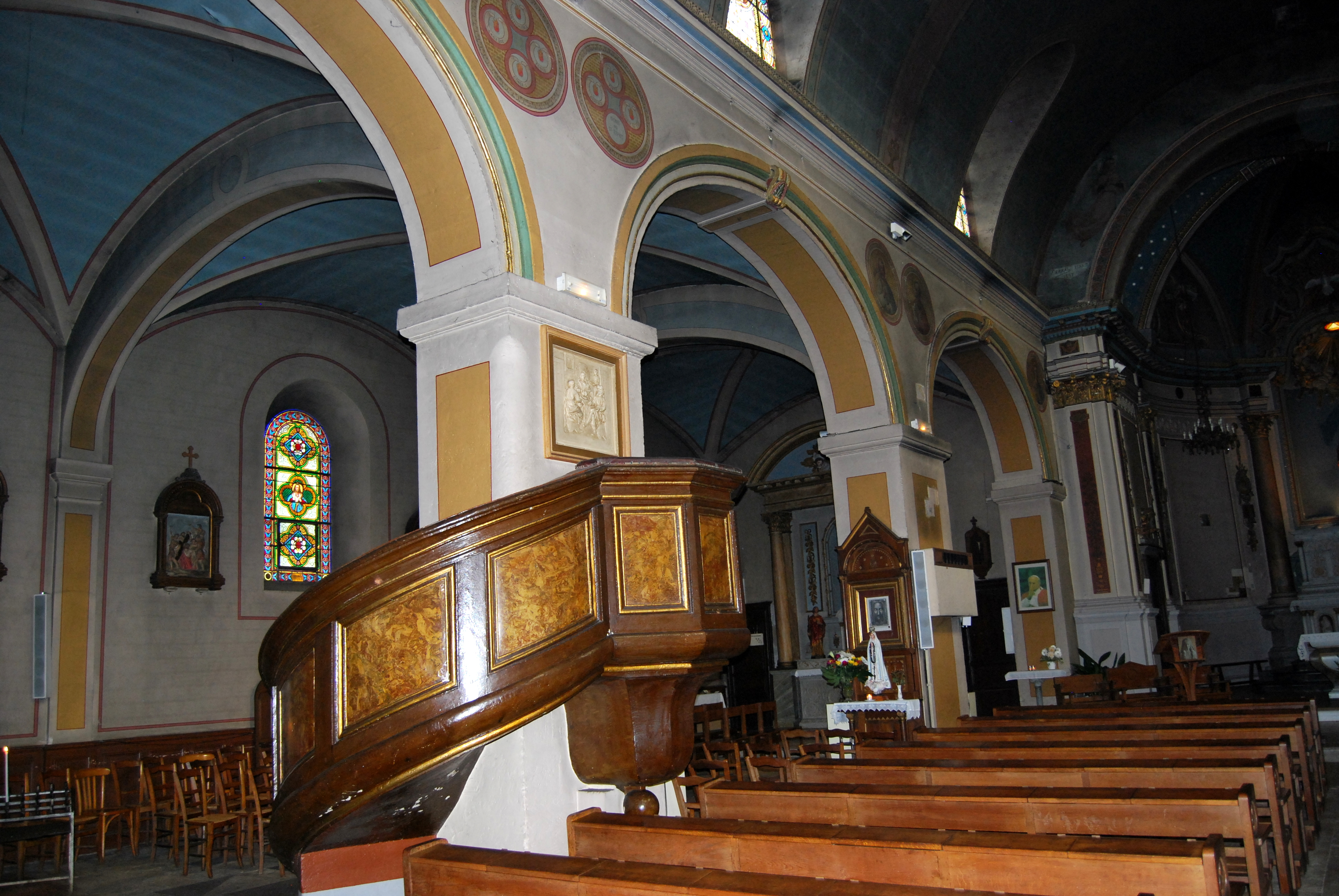 Ambares-et-Lagrave (Gironde) église St Pierre